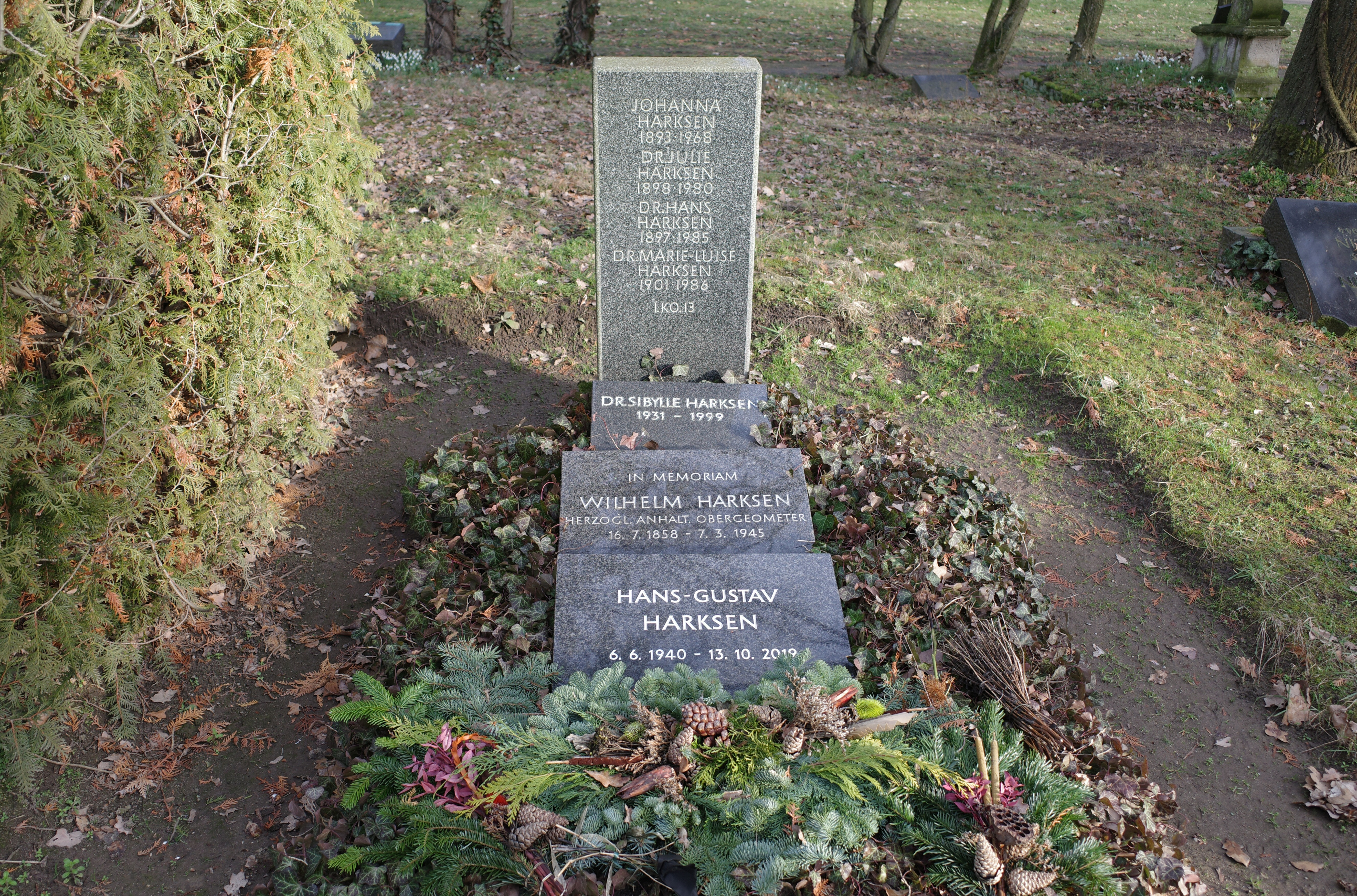 Dessau, Friedhof 3. Ruhestätte von Familie Harksen.